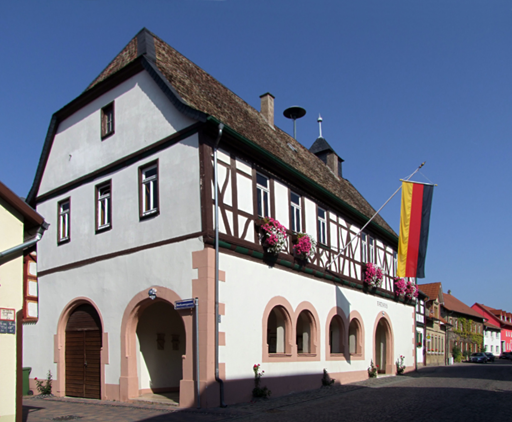 Rathaus der Ortsgemeinde Bechtolsheim, die Fahne hing wegen der an diesem Tag stattgefundenen Bundestagswahl 2009